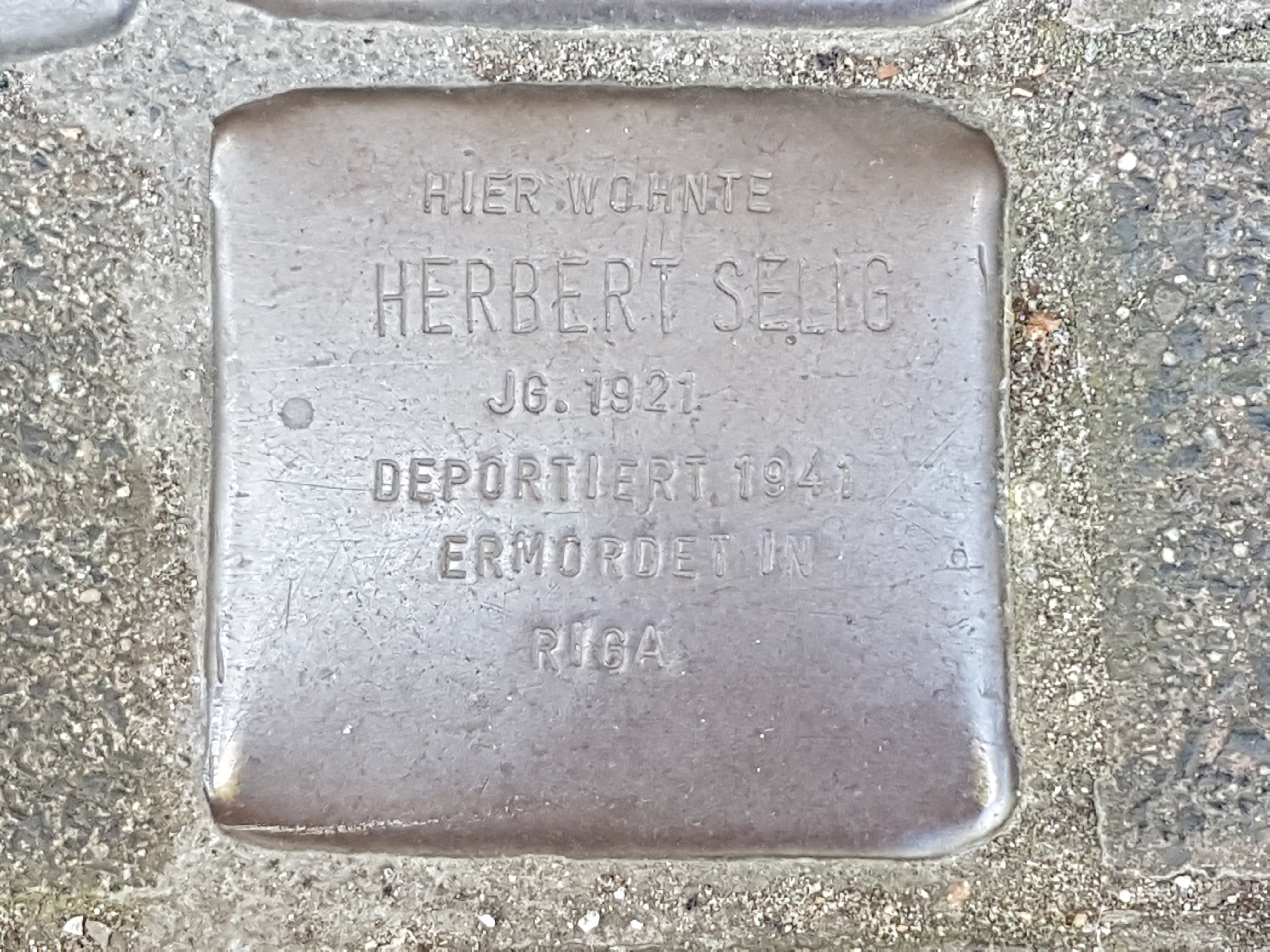 Herbert Selig Stolperstein Duisburg